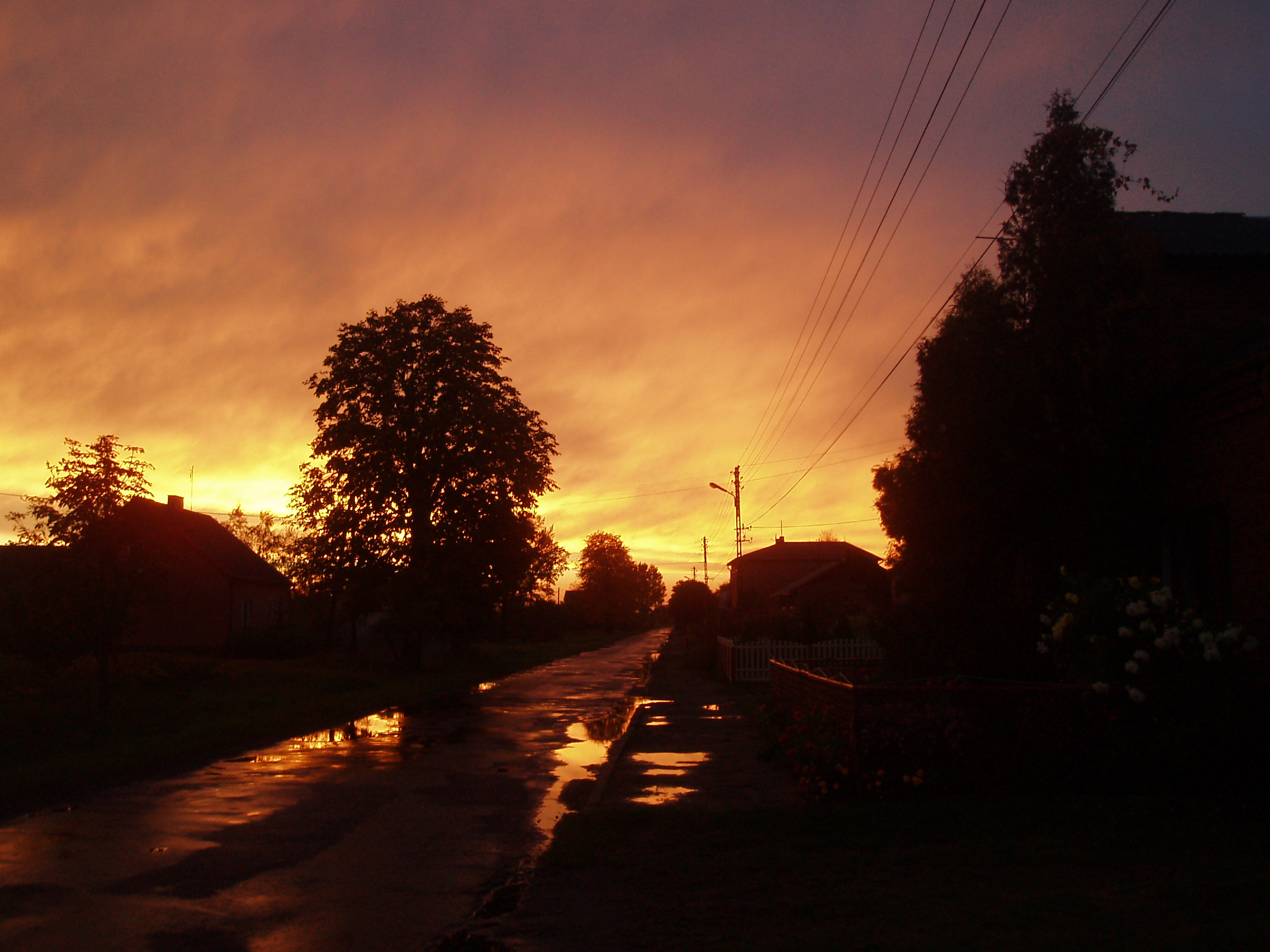 Główna ulica wsi Polichno podczas zachodu słońca.